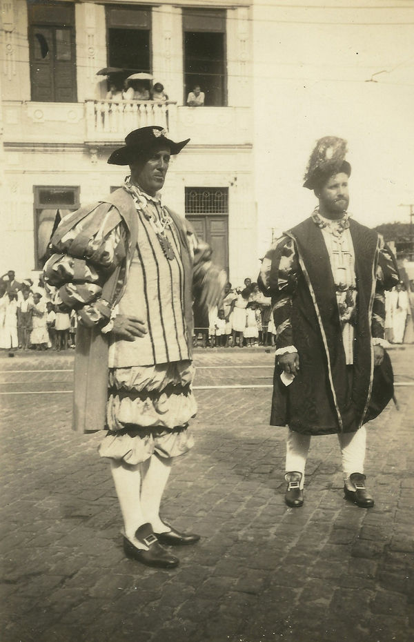 A figura do governador primeiro no afan de cumprir a ordem real de levantar a fortaleza e povoação grande, contando para tanto com o mestre de pedrarias Luiz Dias.